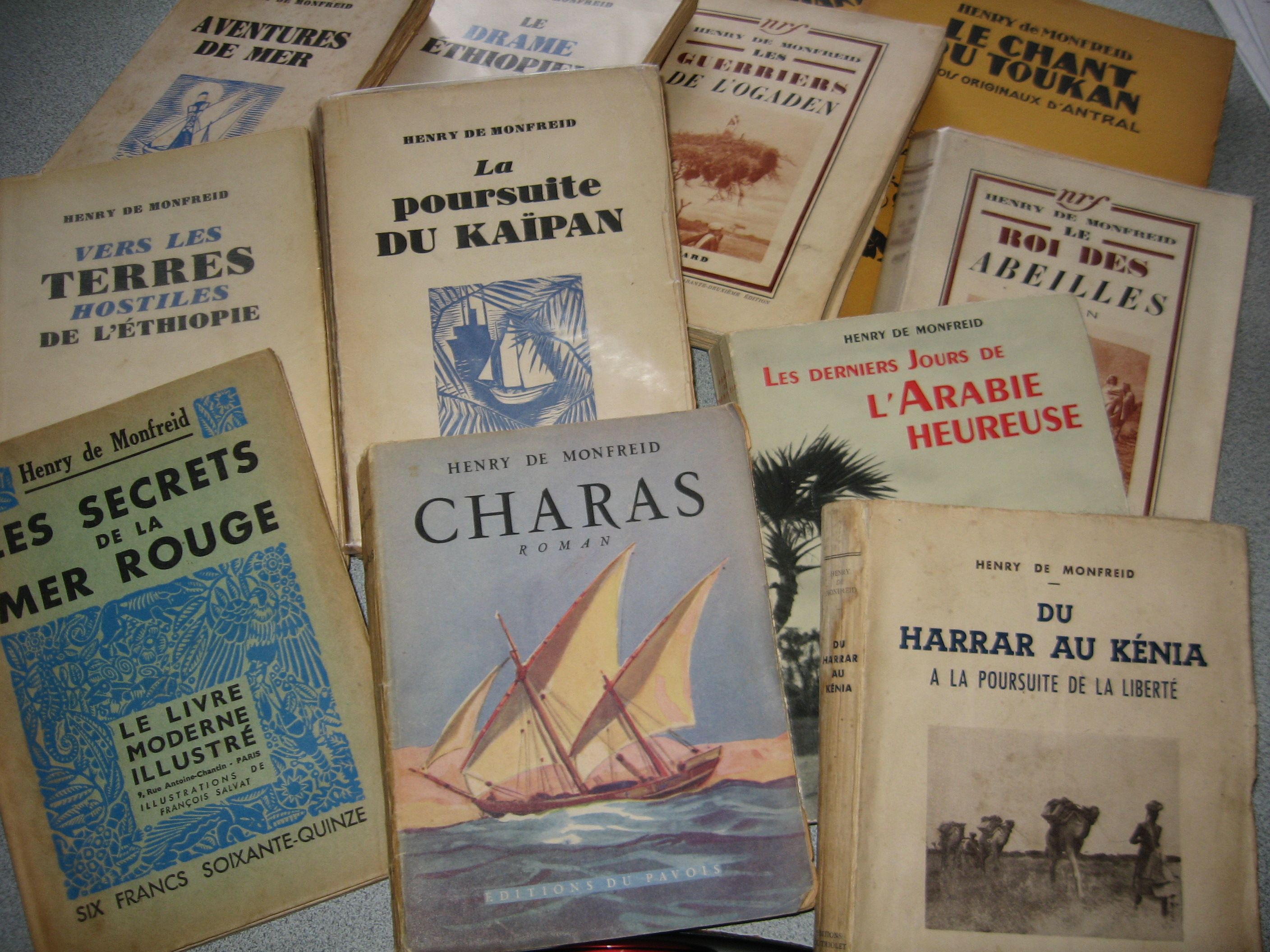 Quelques éditions originales ou anciennes des oeuvres d'Henry de Monfreid.